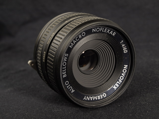 Novoflex Noflexar 1:4 60mm, Makroobjektiv der Firma Novoflex Memmingen, Objektivkopf für z. B. Balgengeräte, ohne Einstellschnecke, Blendenbereich von 4 bis 22, automatischer Springblende, Filtergewinde M52, mit Olympus OM Objektivbajonett